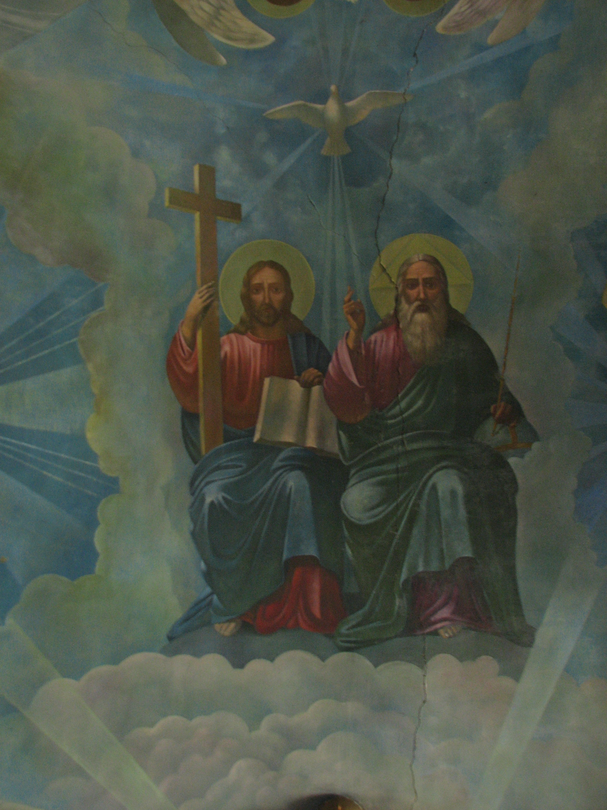 Храм Воздвиження чесного хреста УАПЦ.